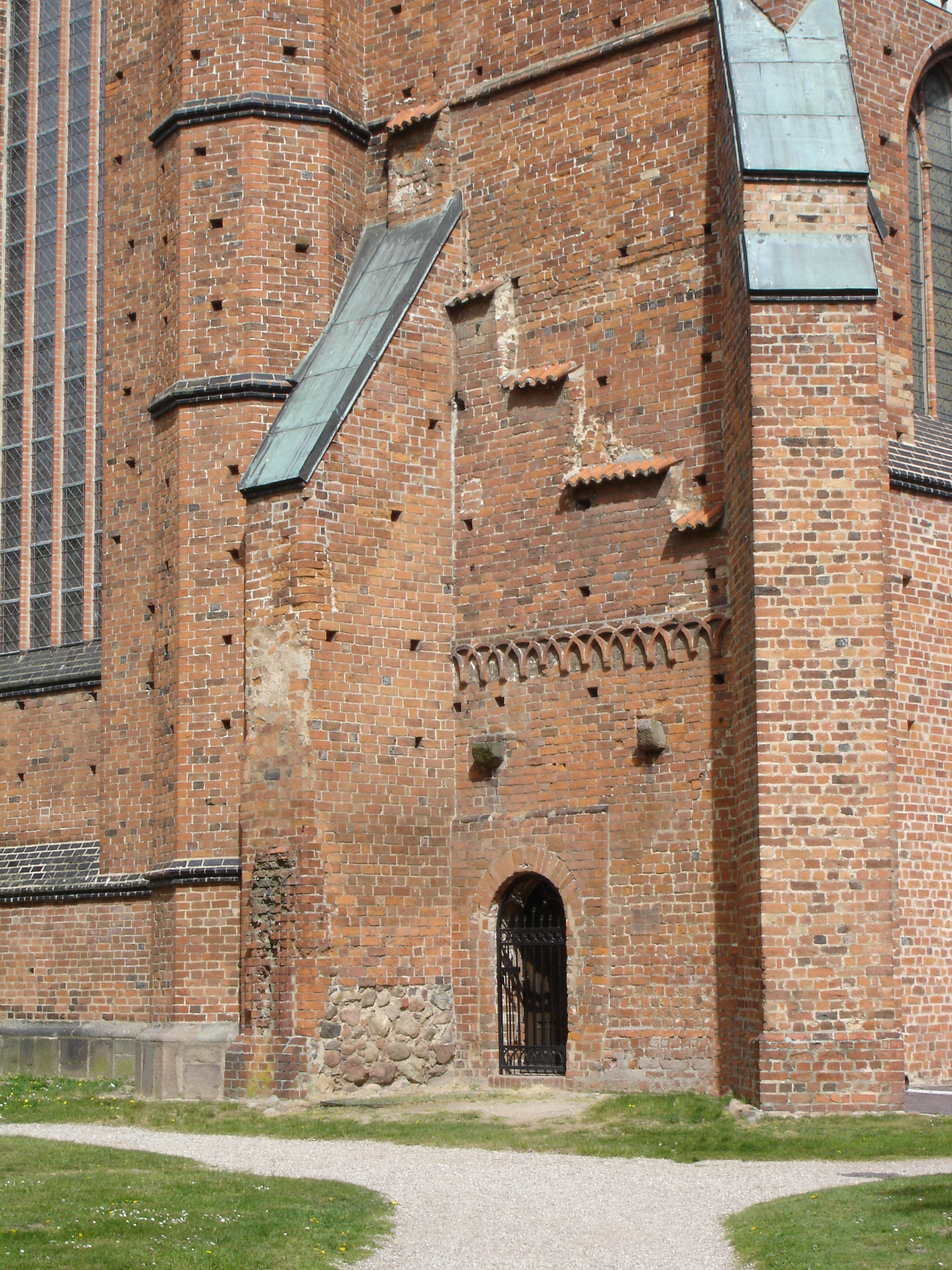 Münster Doberan Teile des Vorgängerbaus / Doberan Minster, part of the first church